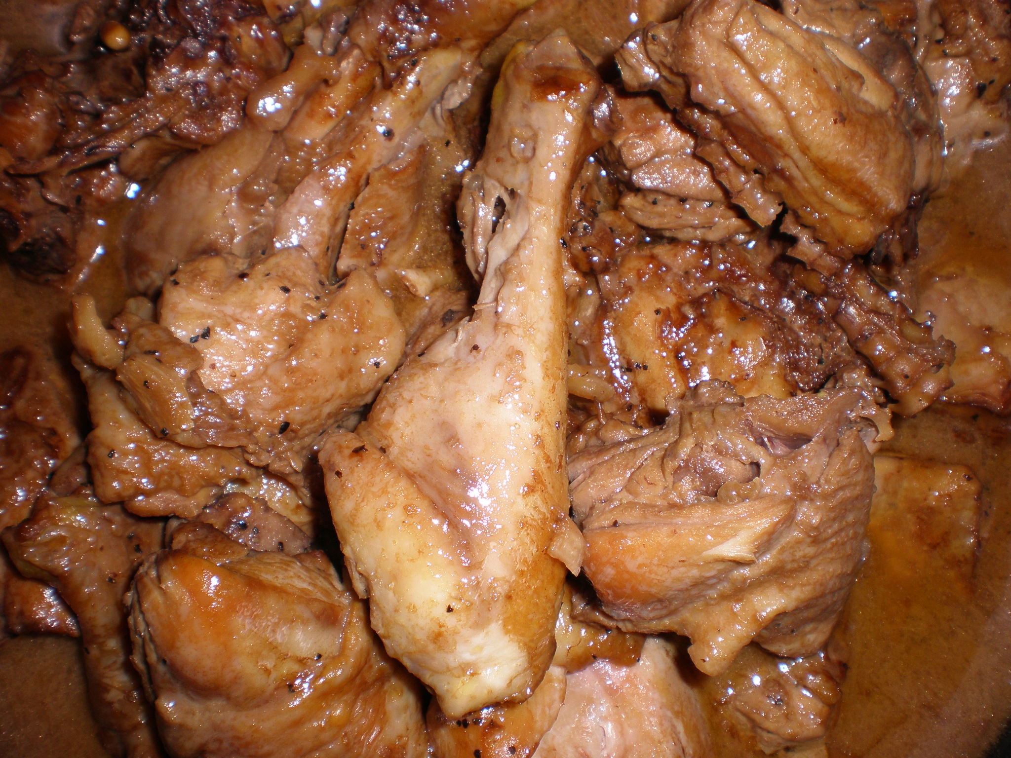 Homemade Filipino chicken adobo